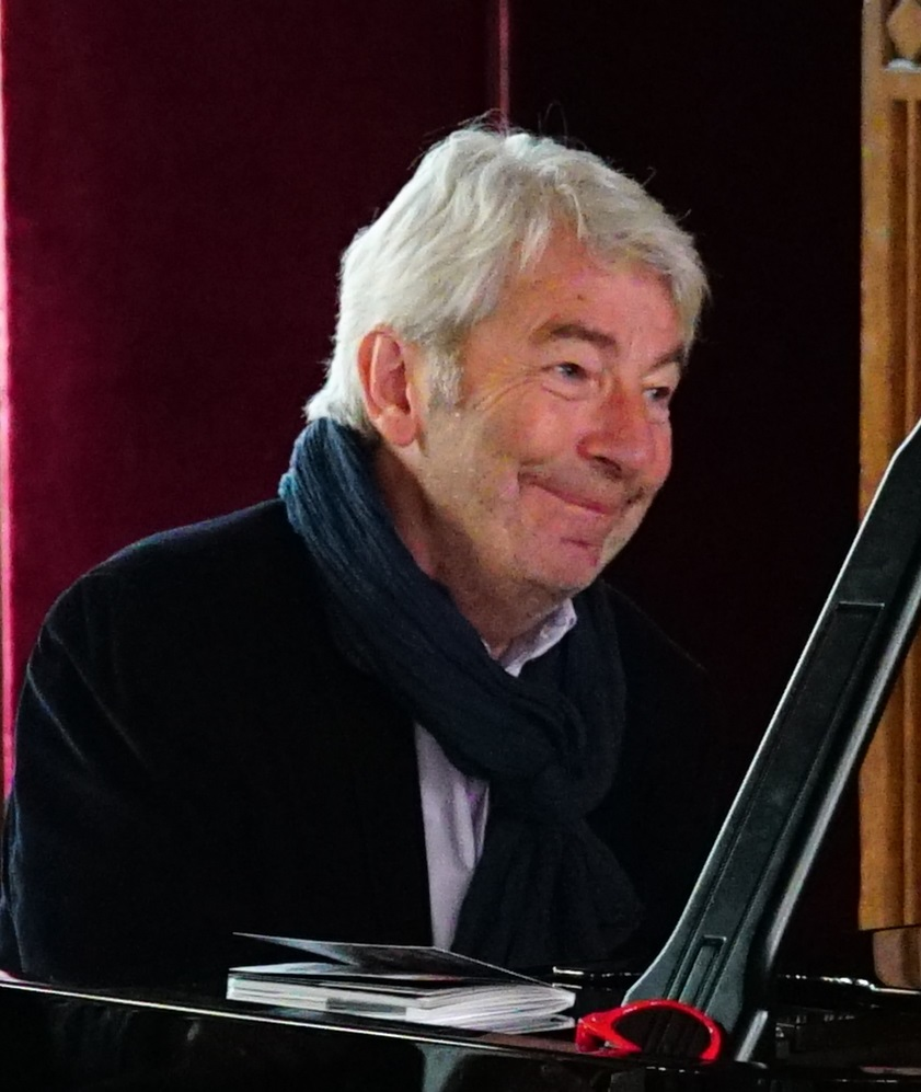 Jean-Philippe Collard présentant les Flâneries musicales 20105 en la demeure des comtes de chamapgne.